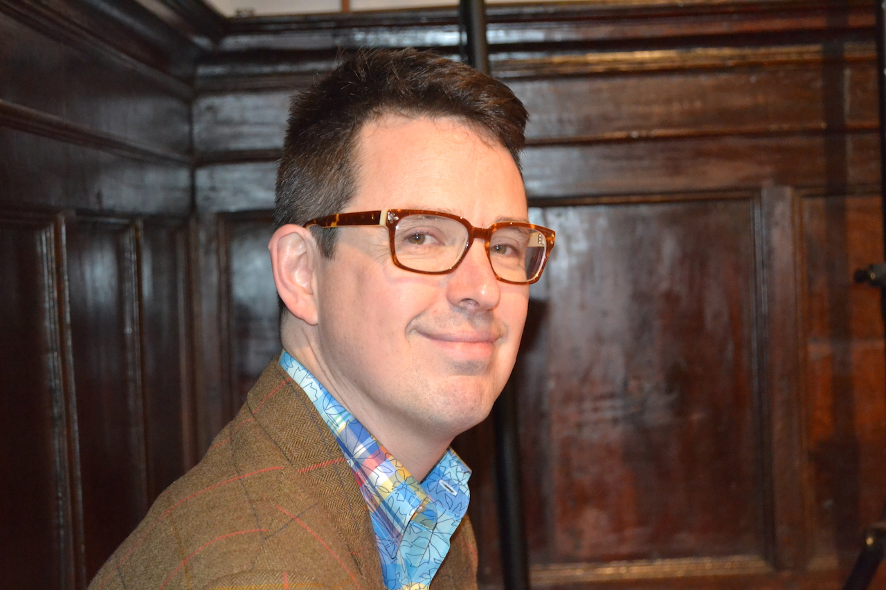 Felix Salmon. Perché la rivincita dei nerd fa bene al giornalismo. Sala del Dottorato. Festival del Giornalismo di Perugia.